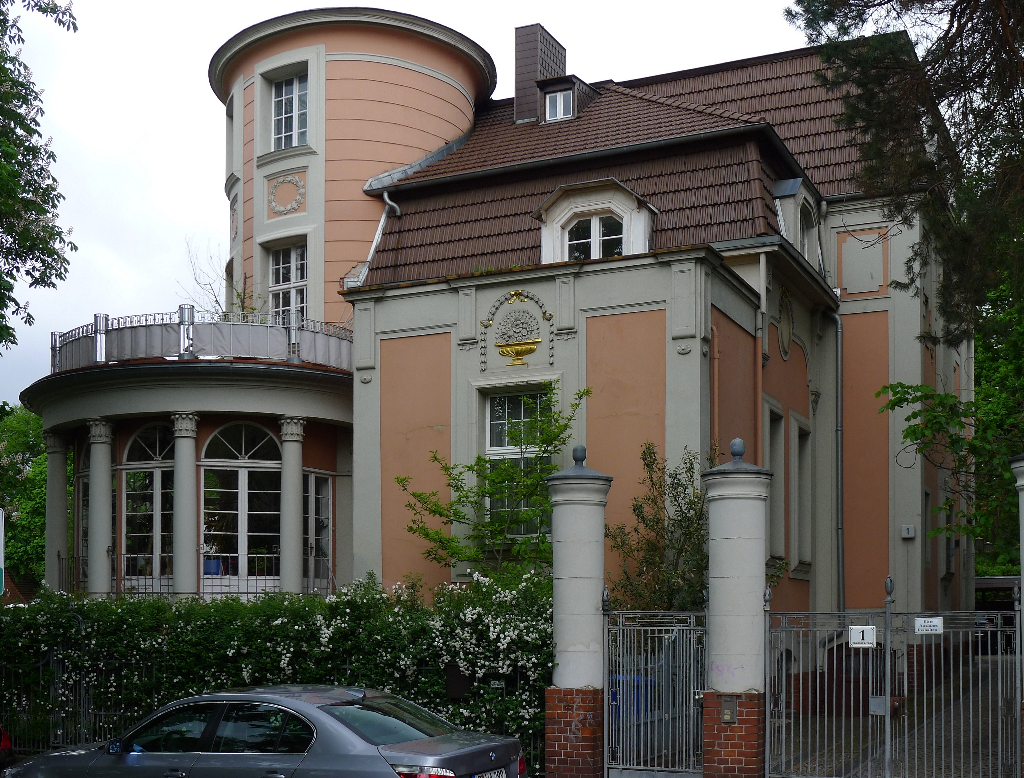 Villa